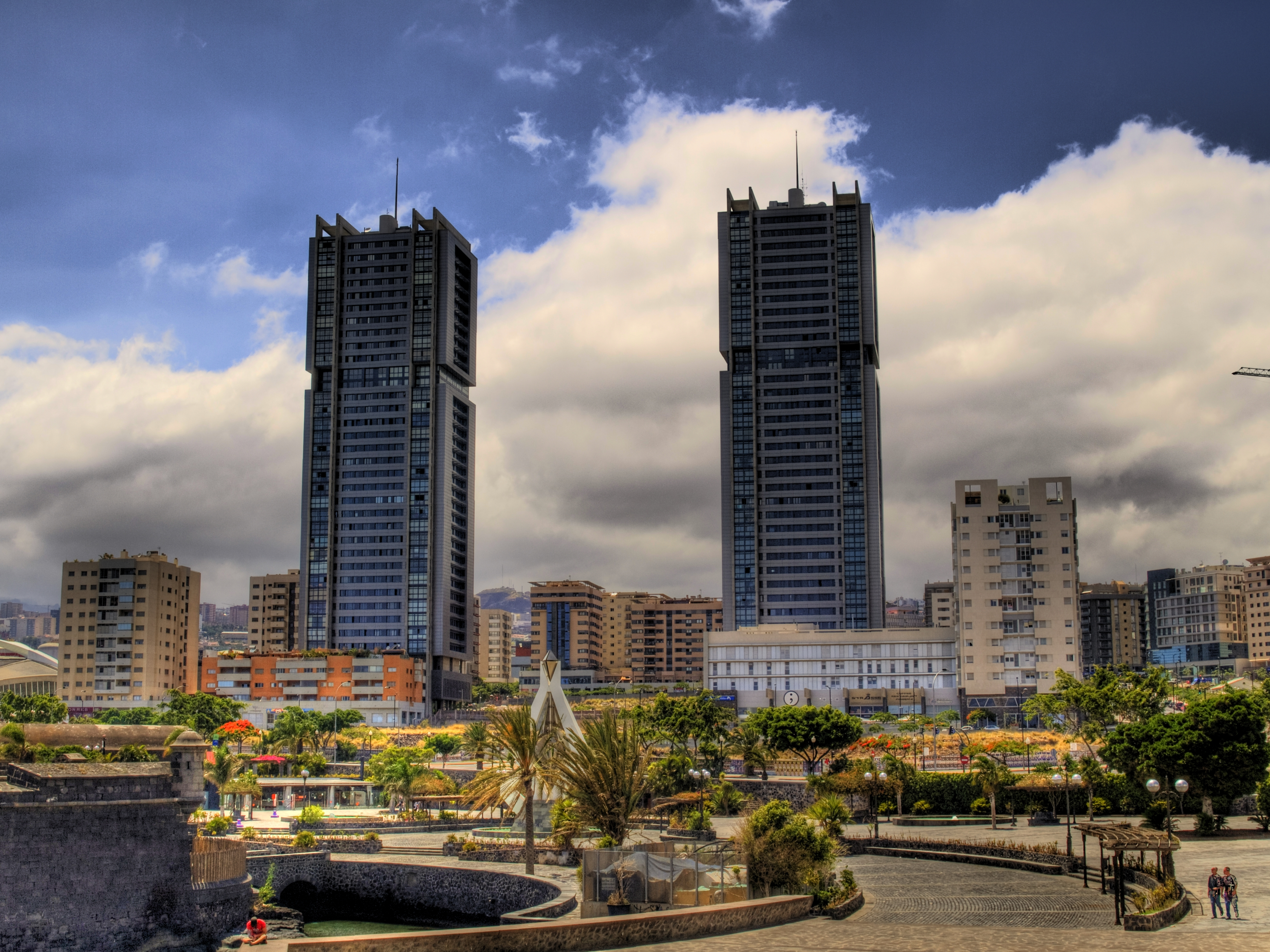 Tenerife_34